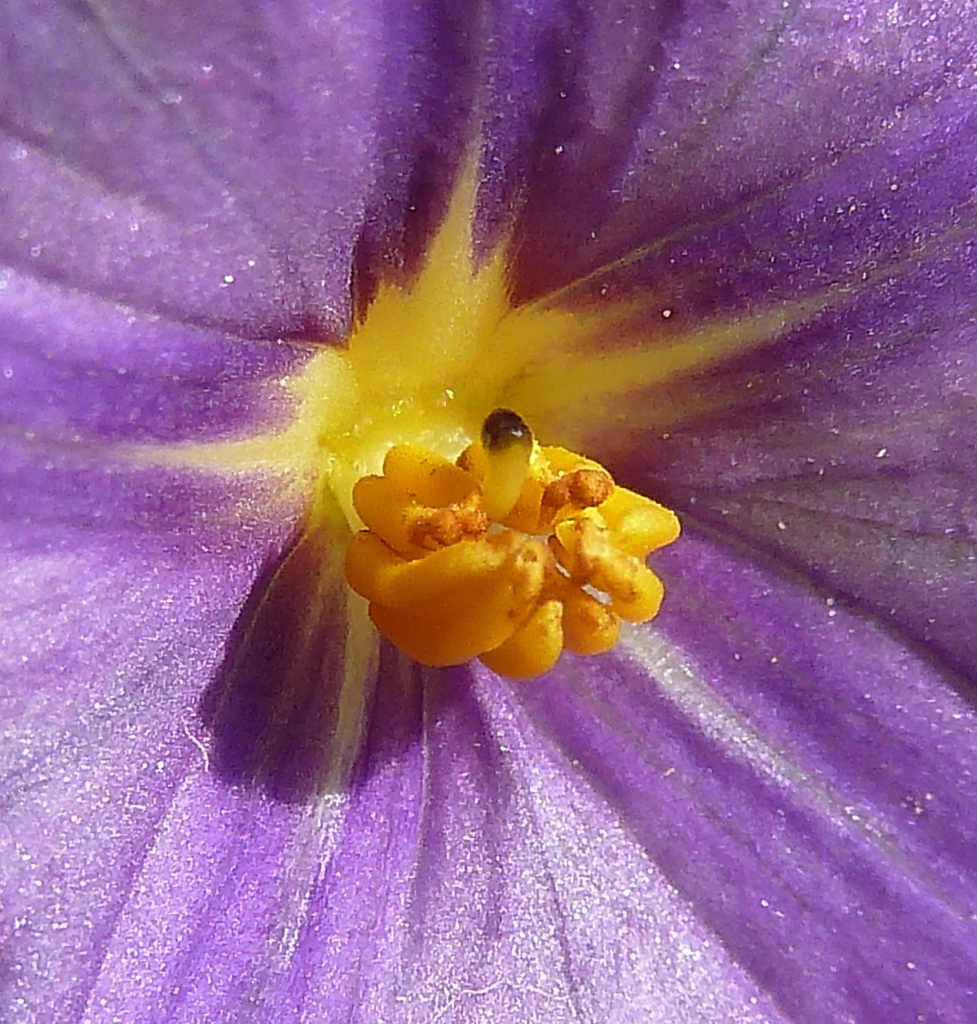 Lycianthes rantonnetii (Planta de la Patata) : Detalle del aparato reproductor : Androceo con etaminas desiguales y gineceo con pistilo curvado - Cultivado/ornamental, Paseo de la Constitución, Águilas (Provincia de Murcia, España).